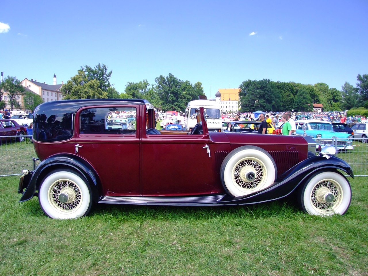 Phantom II Sedanca-de-Ville 7700 ccm 6 Zylinder Quelle: selbst fotografiert, 06/2007 Fotograf: Späth Chr.